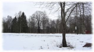 Fliken Sågbacken av sven_olovl